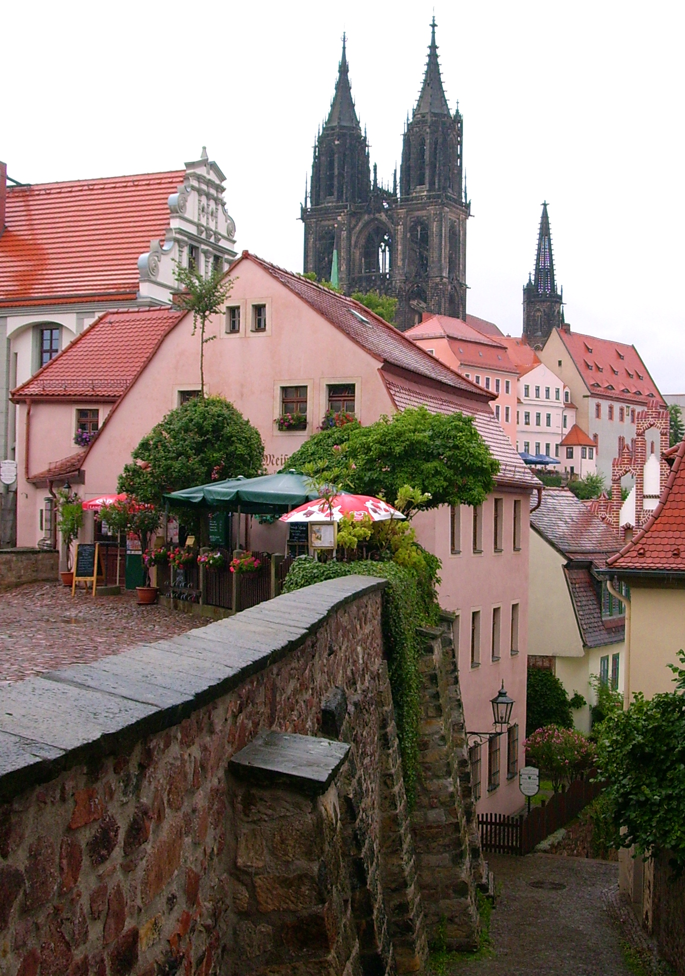 Wohnhaus mit Café, Freiheit 3 in Meißen